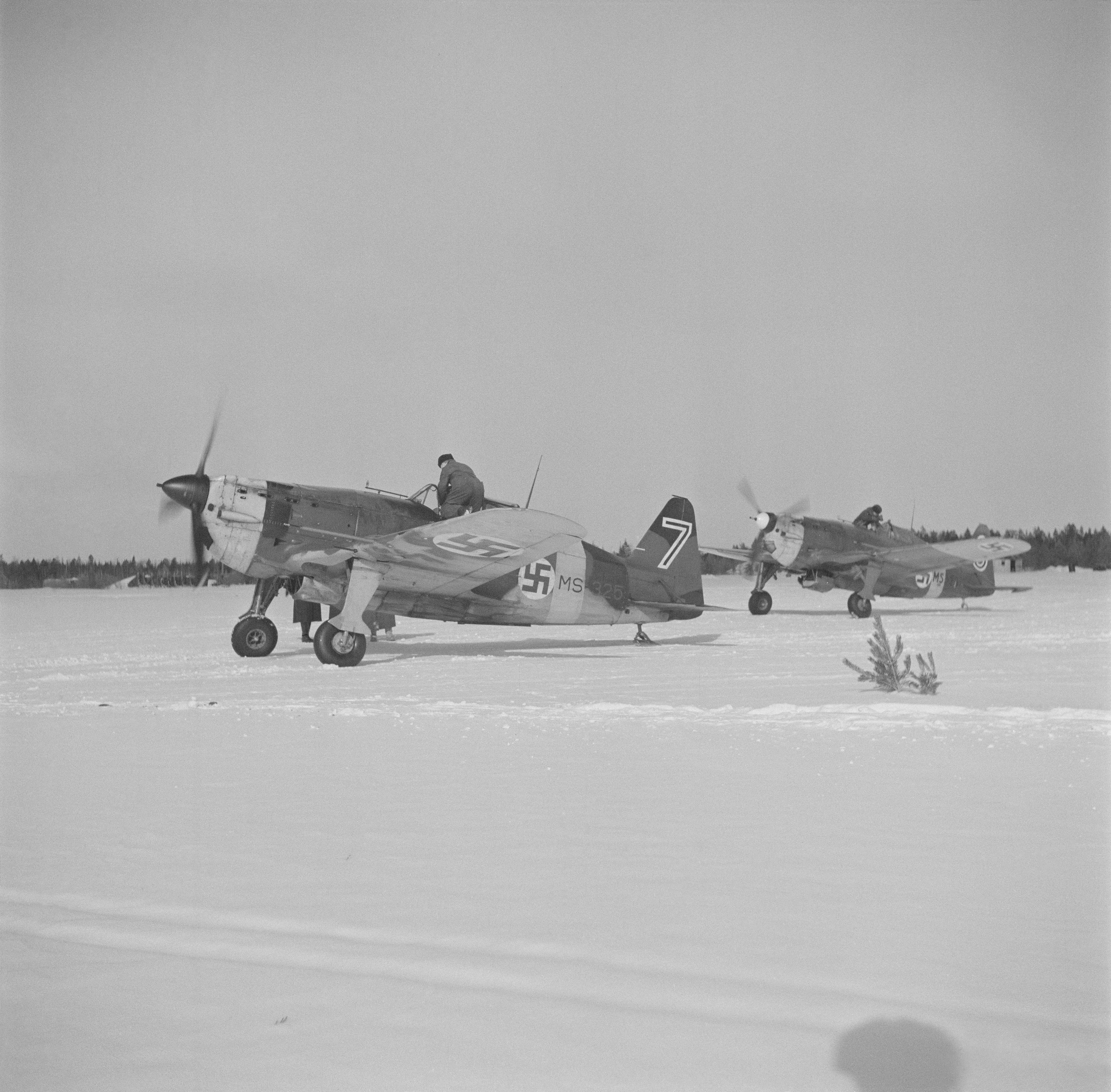 Hävittäjät starttaavat partiolennolle: tuliputket ovat valmiit puhumaan. (Kuvassa Morane-Saulnier M.S.406 -hävittäjiä). Kuvauspaikka: Äänislinna, Viitana